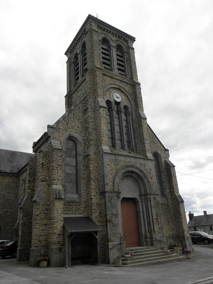 Église Saint-Martin à Princé (35).